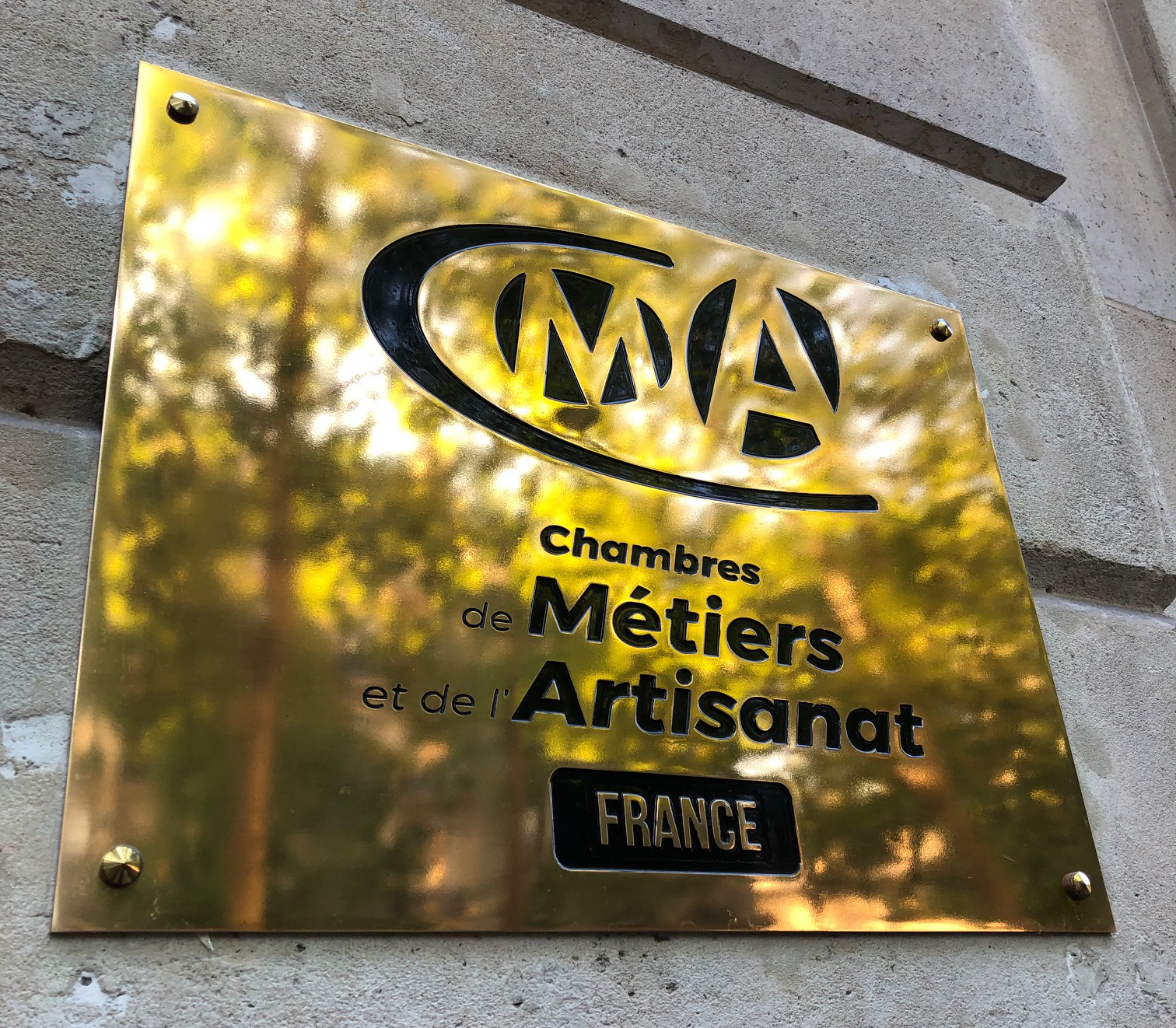 Plaque à l'entrée de l'établissement